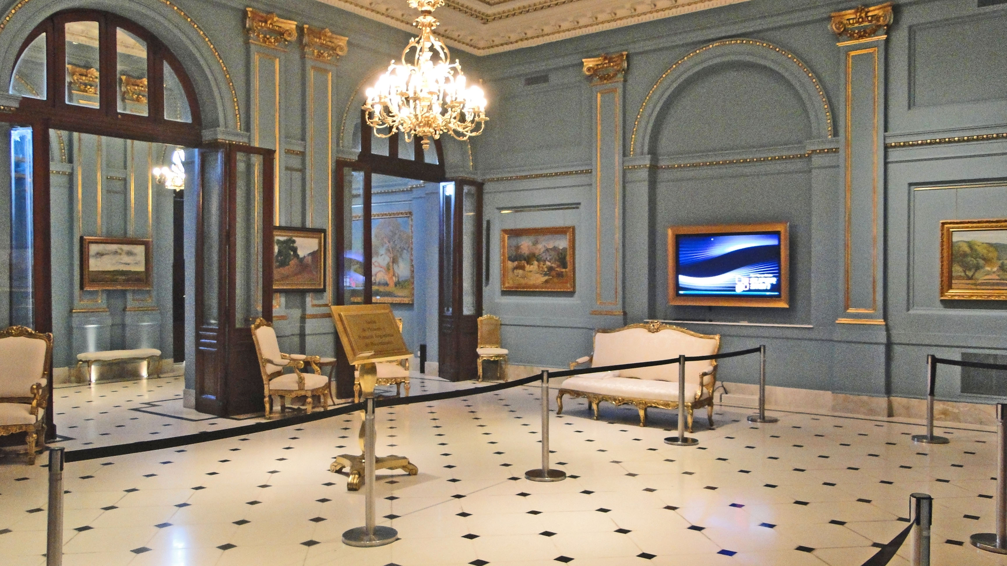 Salón Blanco del Palacio de gobierno de la República Argentina.